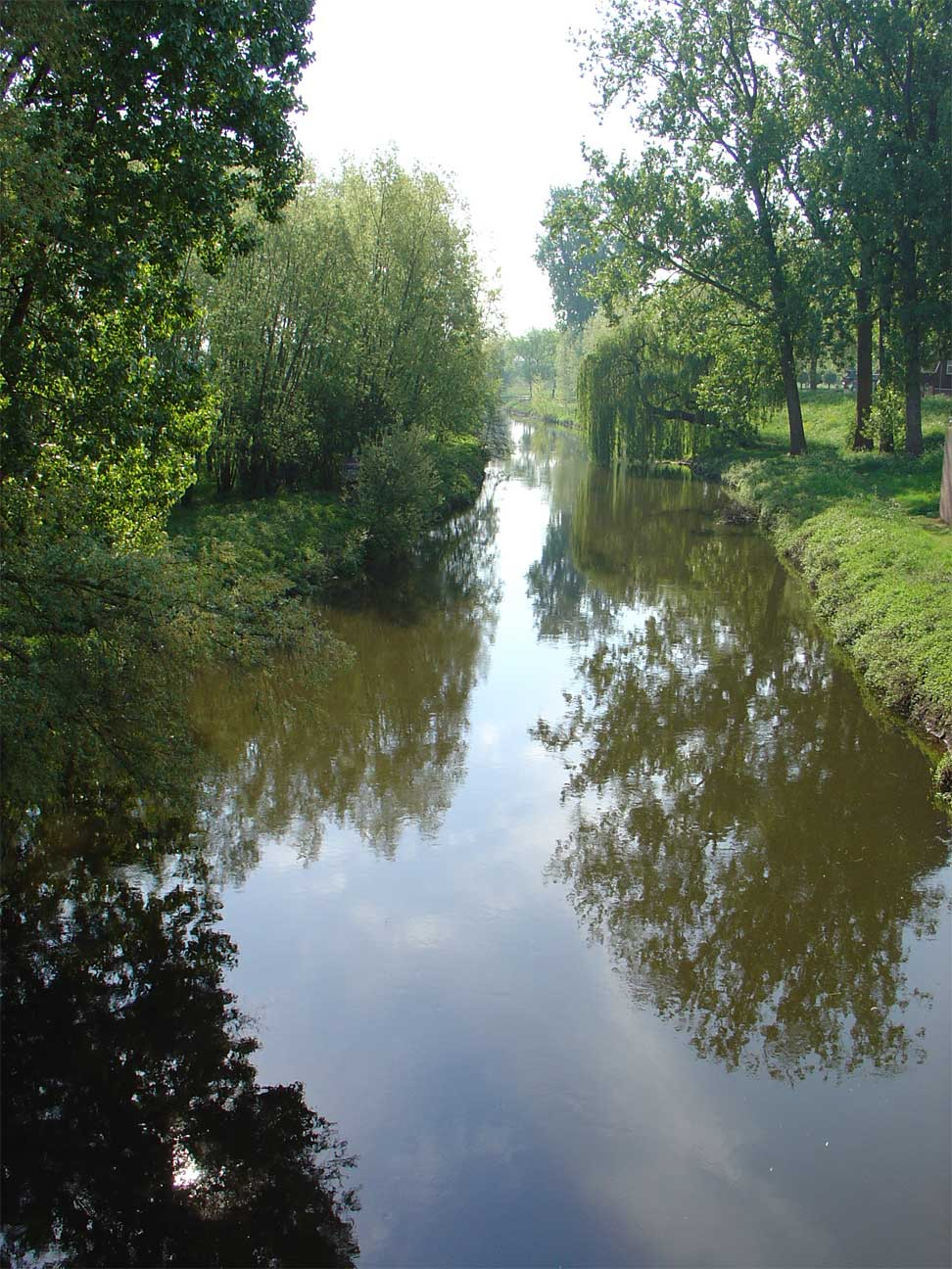 De rivier de Niers bij Gennep (The river Niers at Gennep in the Netherlands)